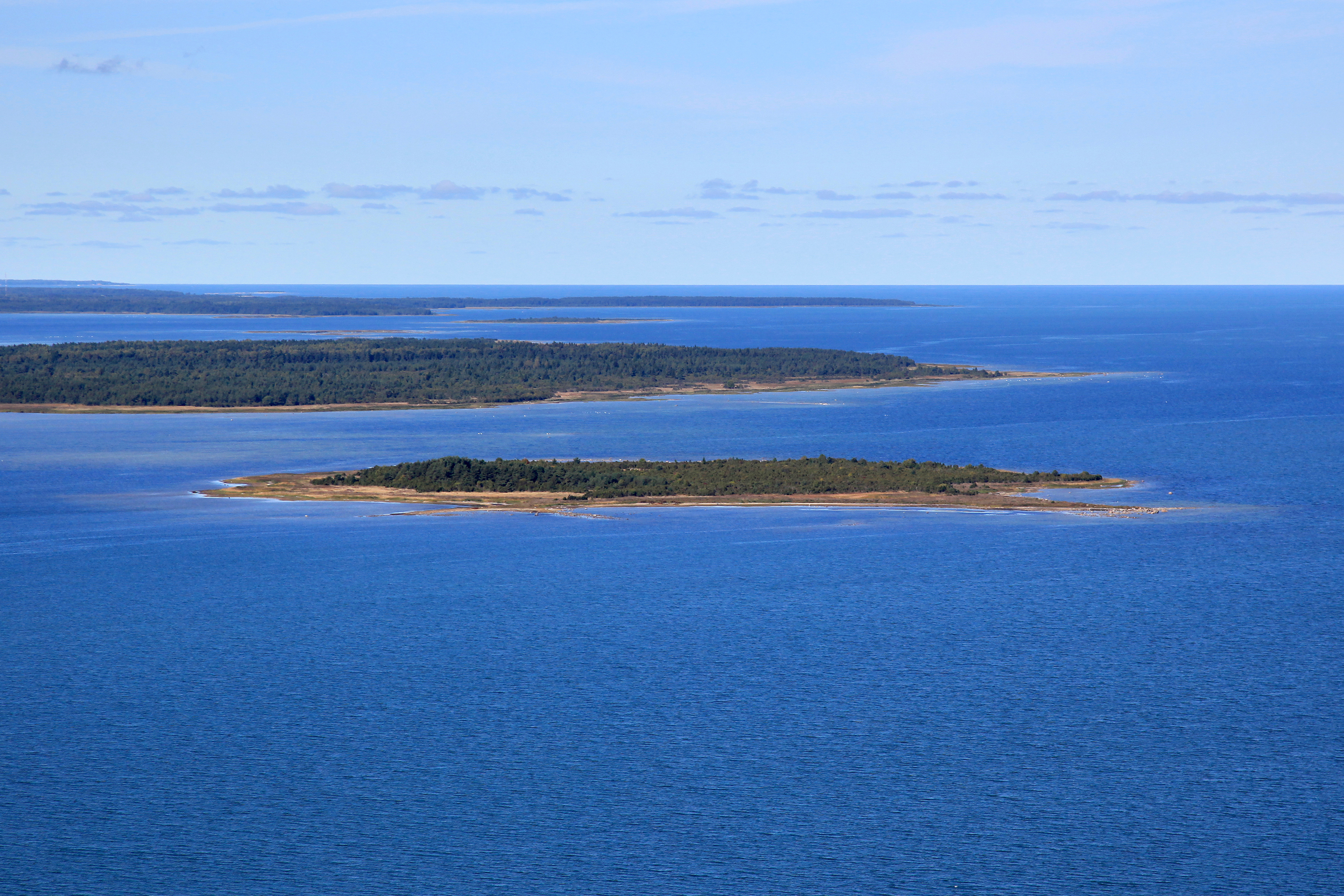 Hõralaid